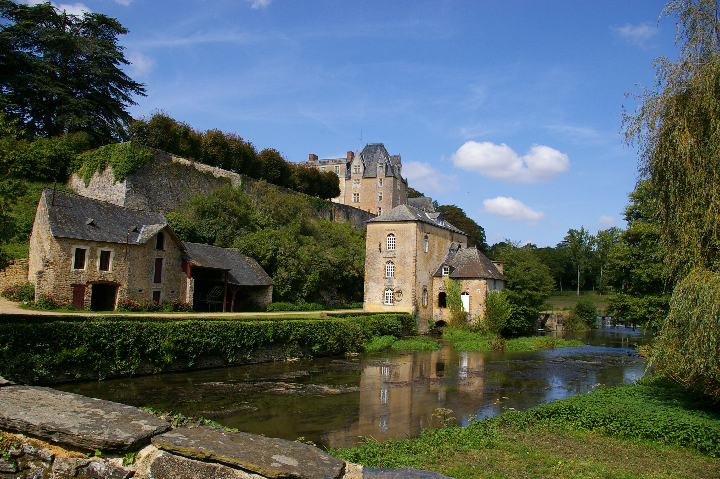 Moulin et château de Thévalles (Chémeré-le-Roi, Mayenne)